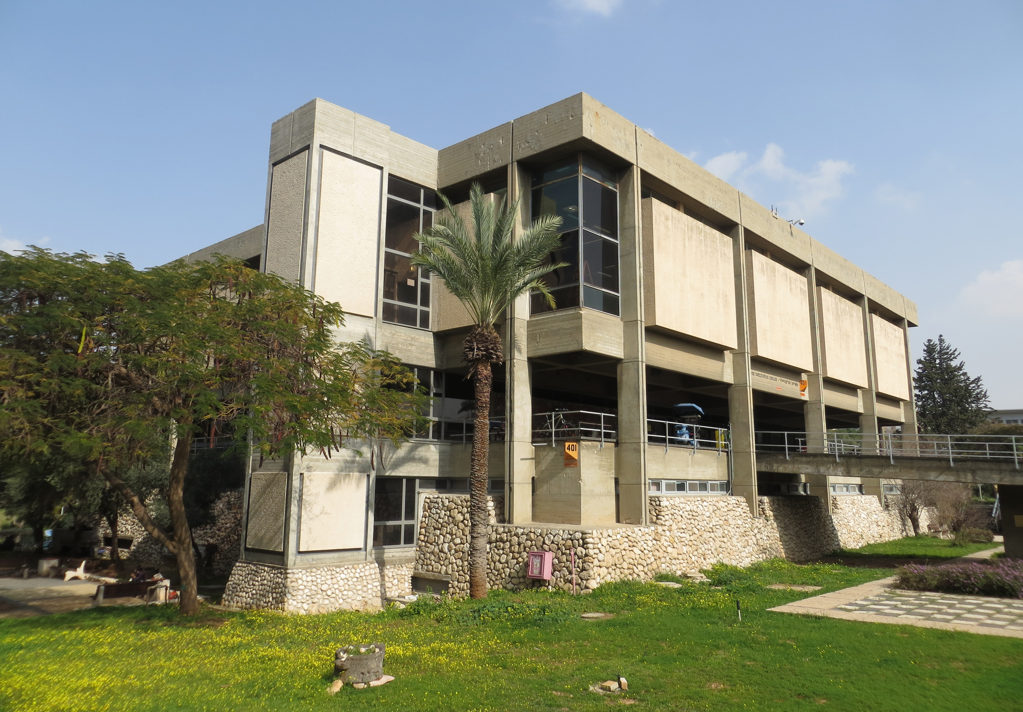 libraryMain